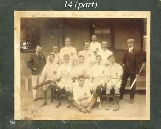 fotografia conmemorativa que pertenecio a R.N. Penny